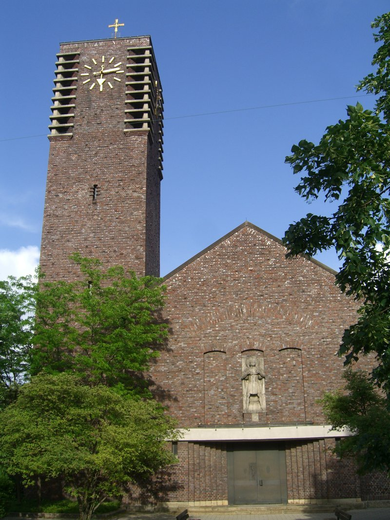 St. Sebastian, Munich, Germany